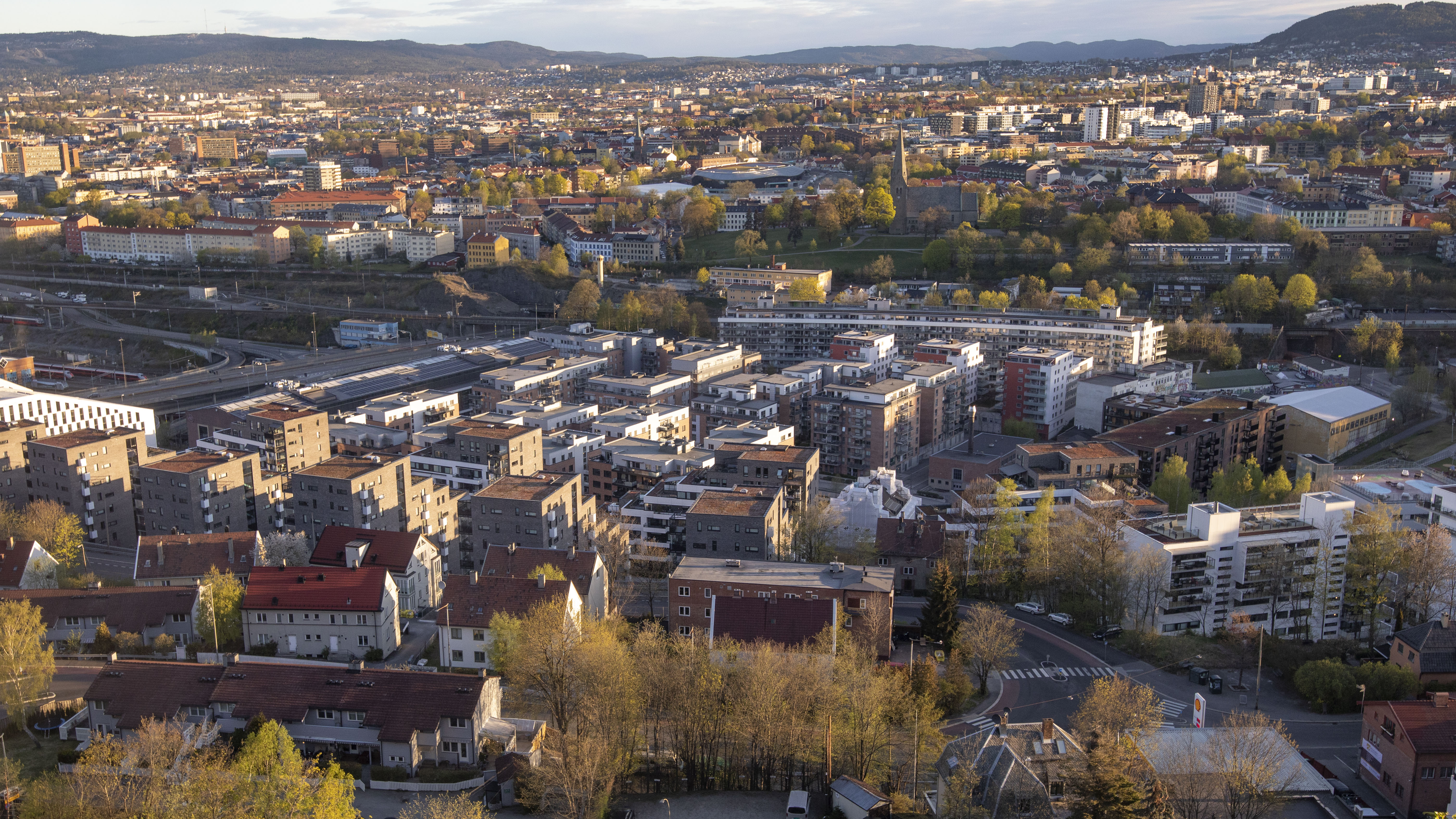 Kvernerbyen, fotografert fra Ekeberg i 2020